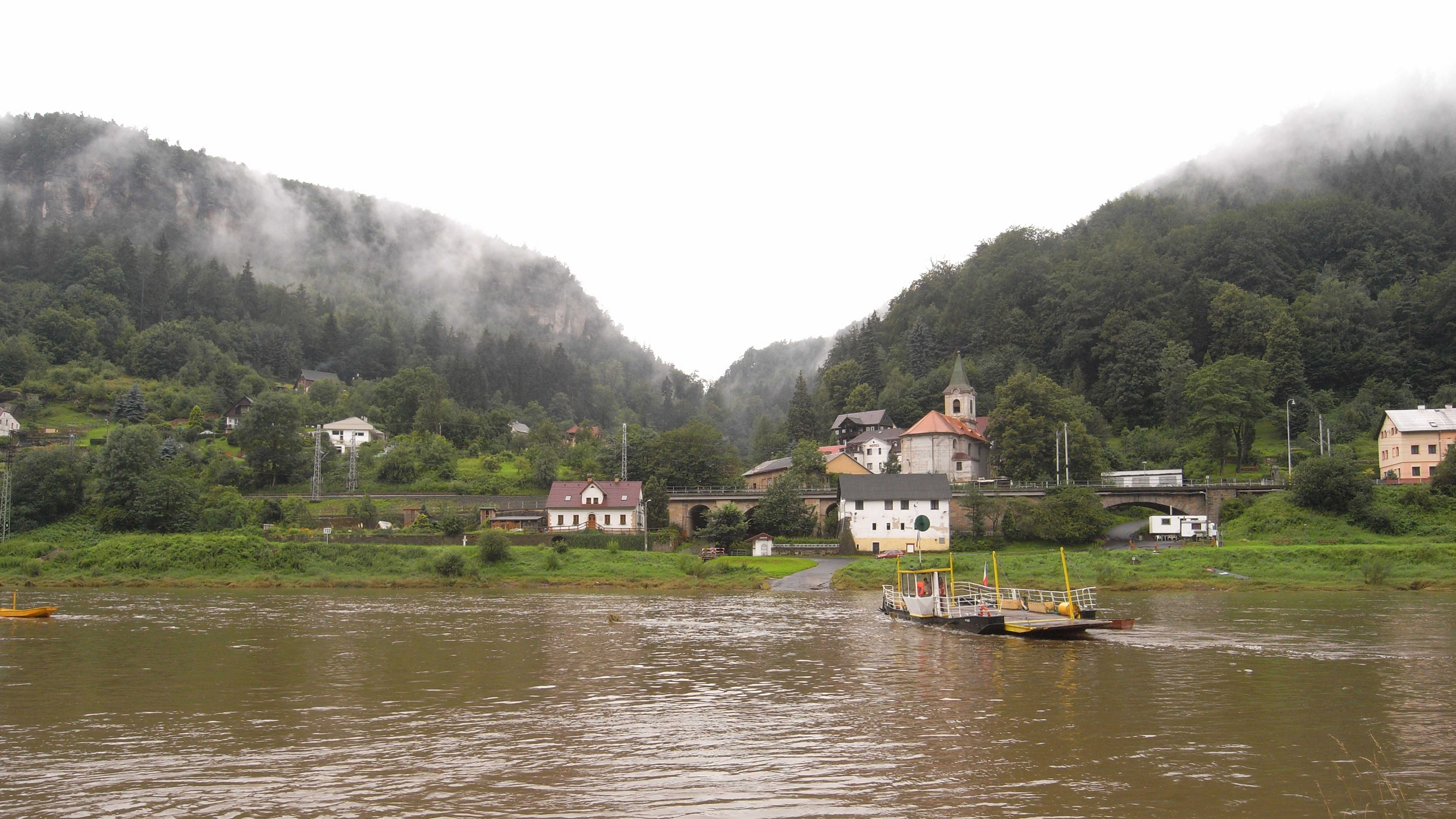 Dolní Žleb / Niedergrund, an der Elbe (Böhmisch-Sächsische Schweiz, Tschechische Republik)